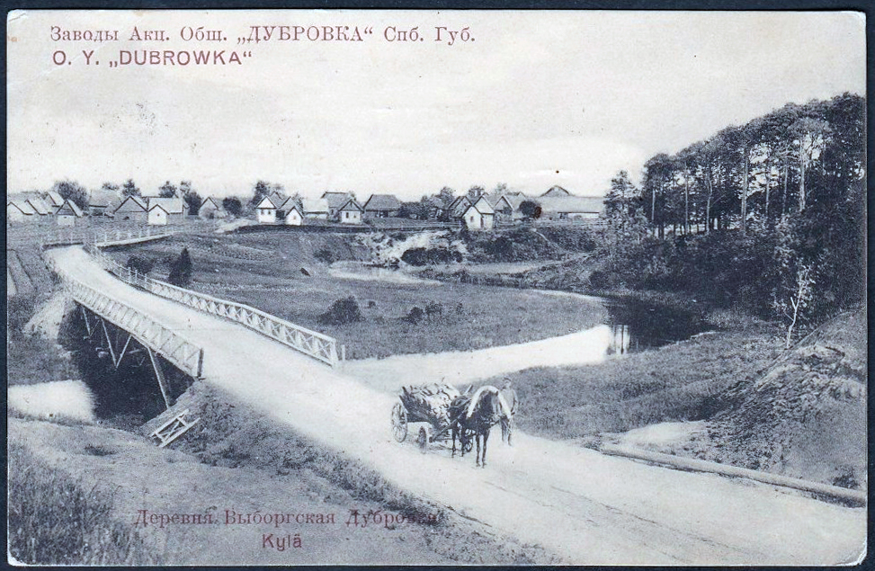 Фотооткрытка